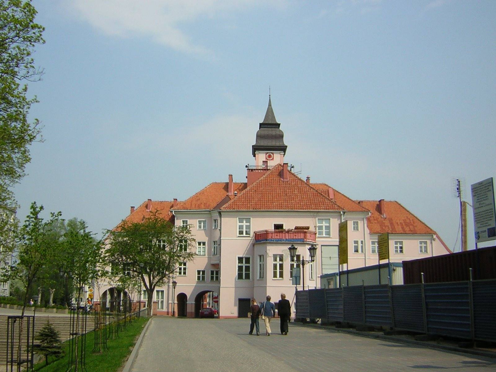 Iławski Ratusz od strony południowej. Marcin n MARCIN N 06:46, 26 June 2006 (UTC)